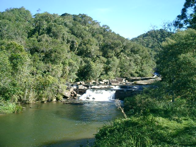 Rio Paraíbuna dentro do Parque Estadual da Serra do Mar